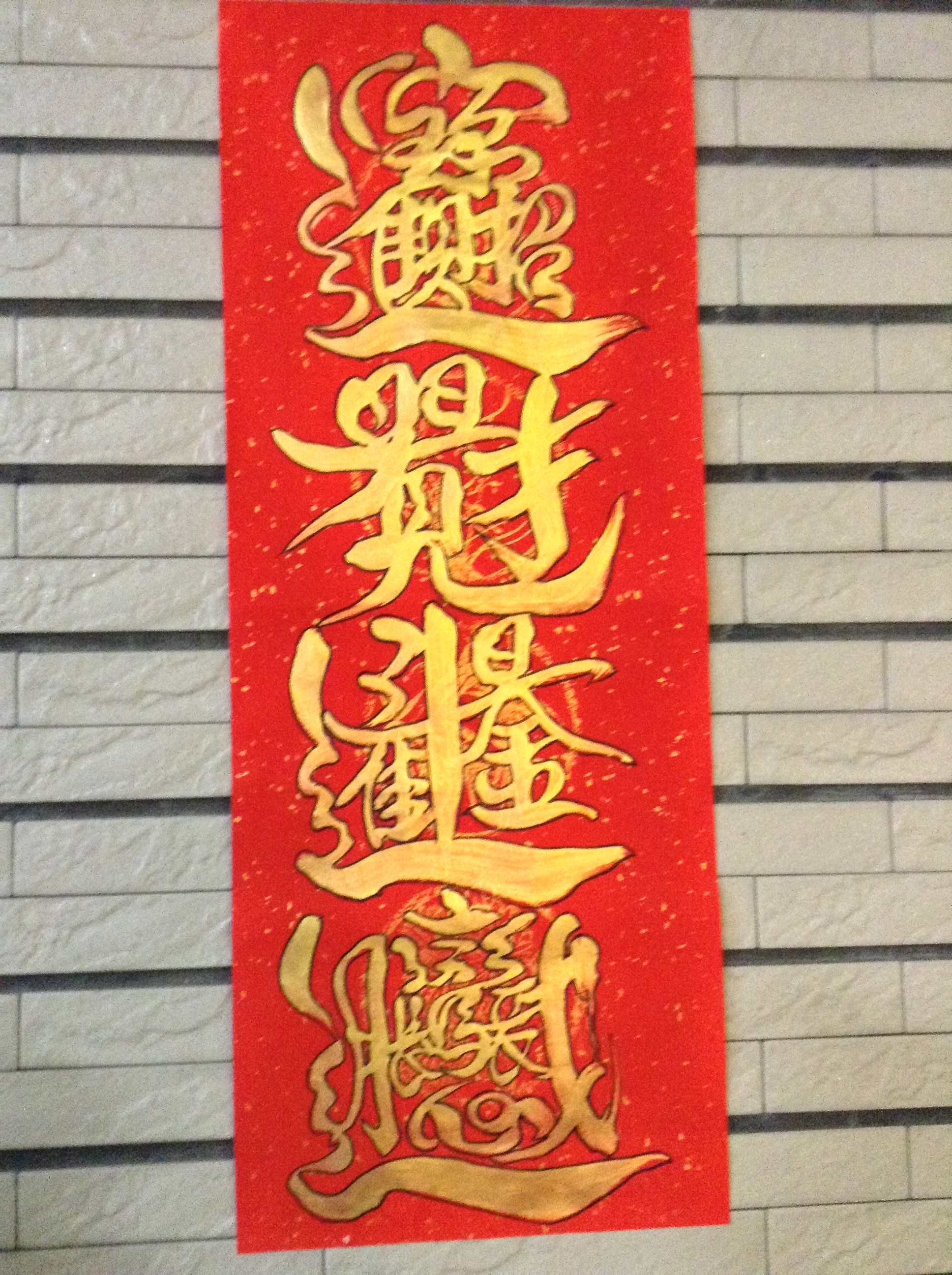 春聯字中字 日日有財